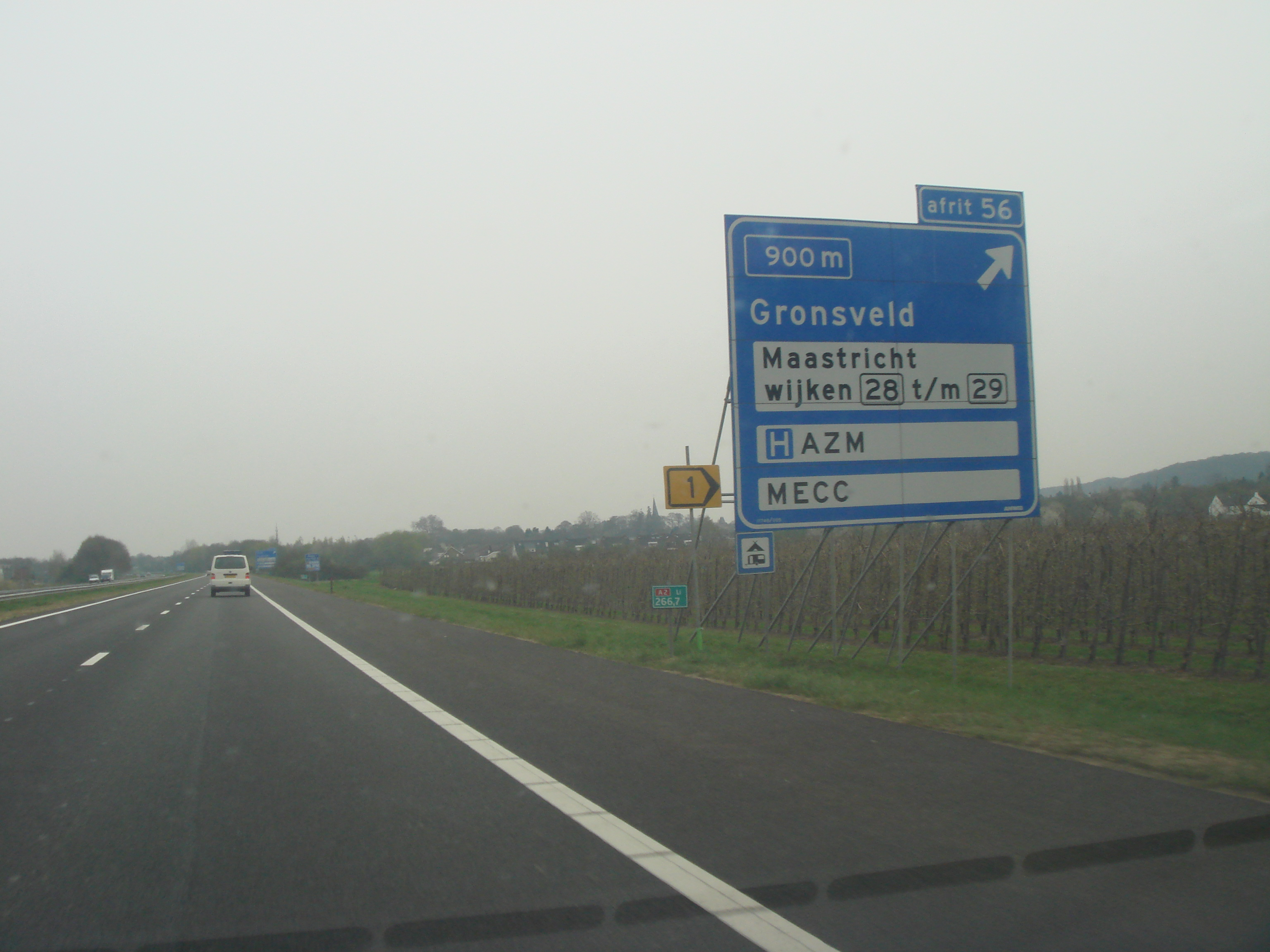 L'autoroute néerlandaise A2 à la sortie pour Gronsveld